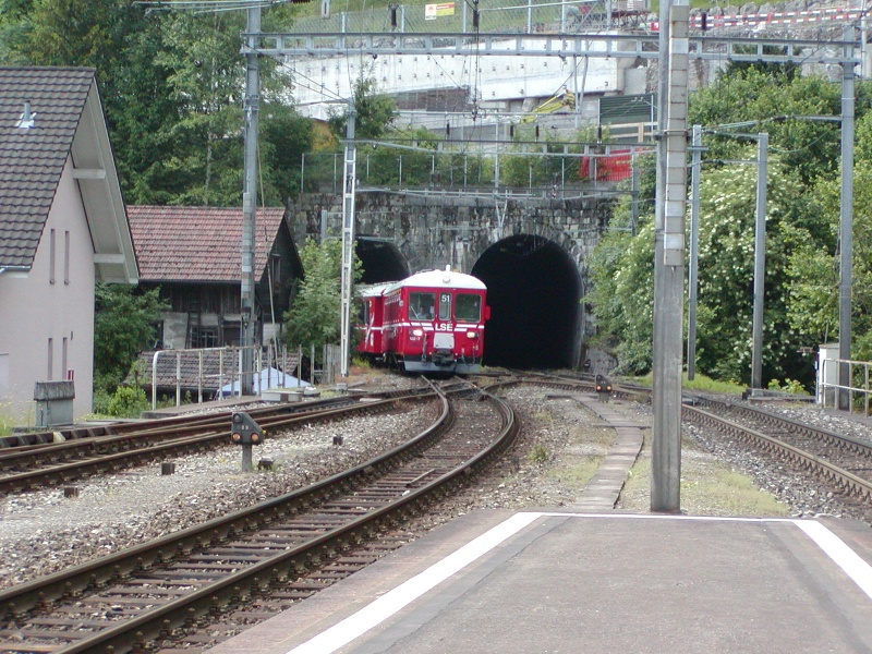 LSE Hergiswil